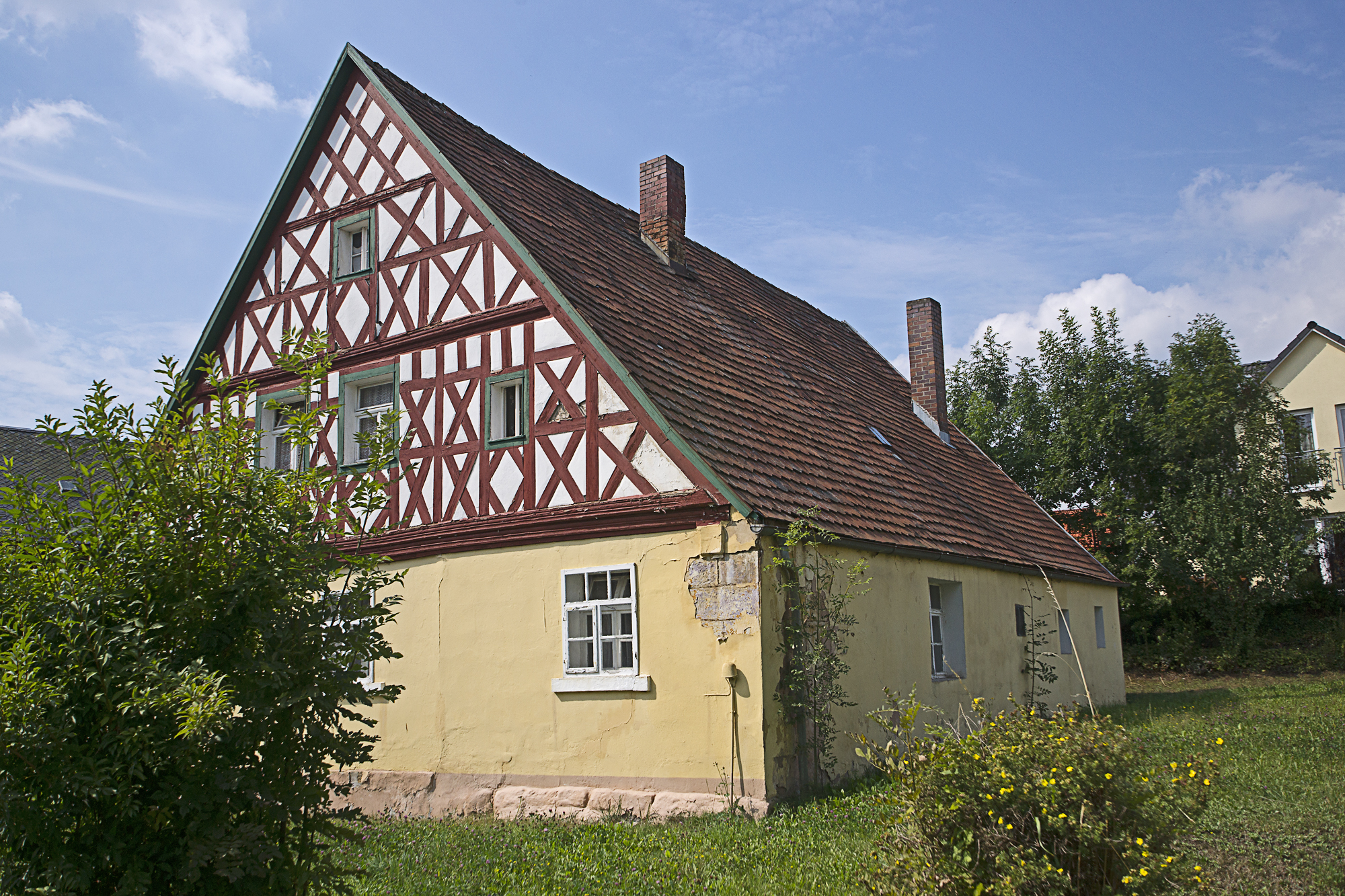 Wohnstallhaus, Giebelständiger, eingeschossiger Satteldachbau mit Fachwerkgiebel, um 1800This is a photograph of an architectural monument.